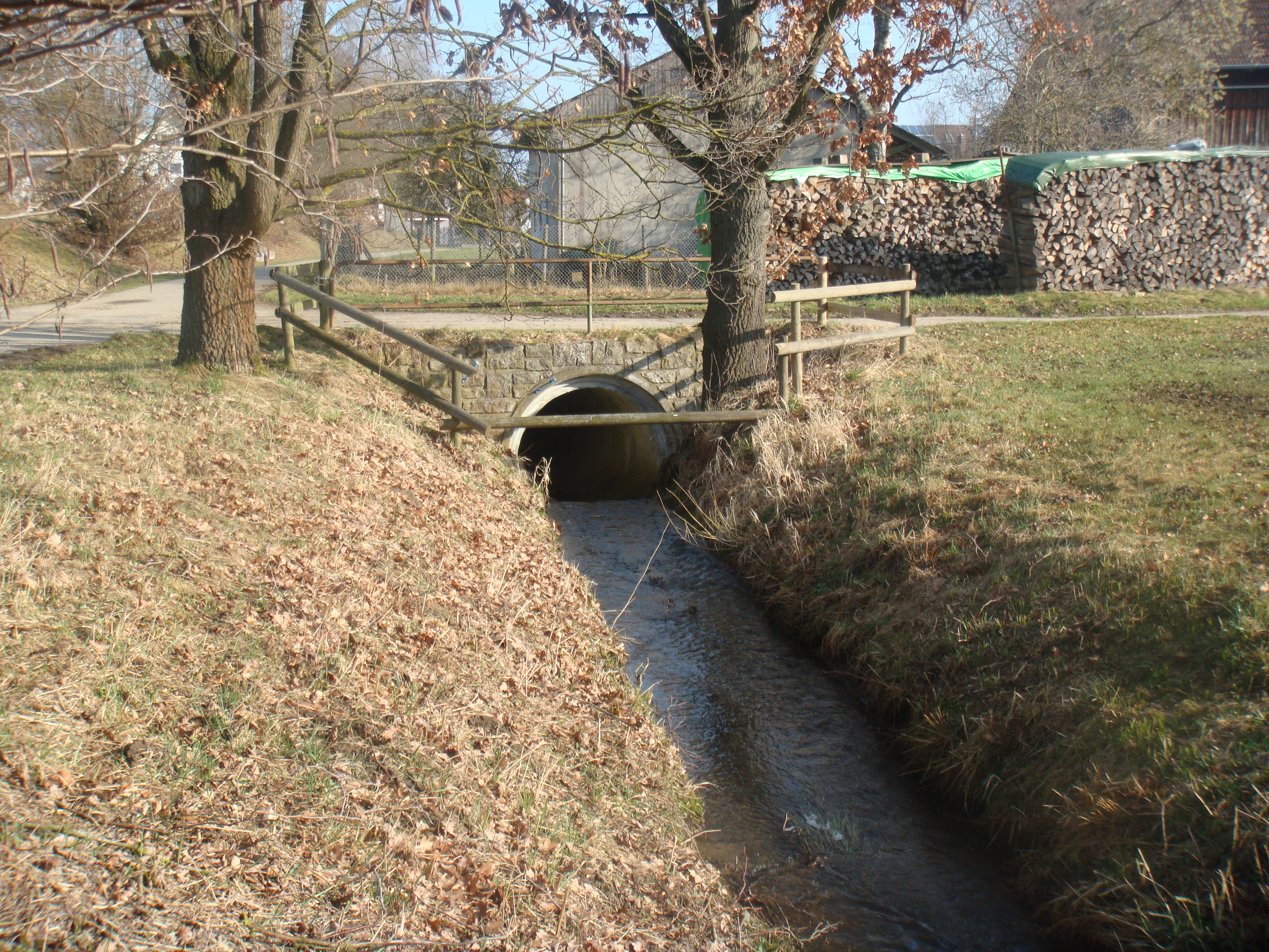 Einlauf in die Verdolung südlich von Wangen